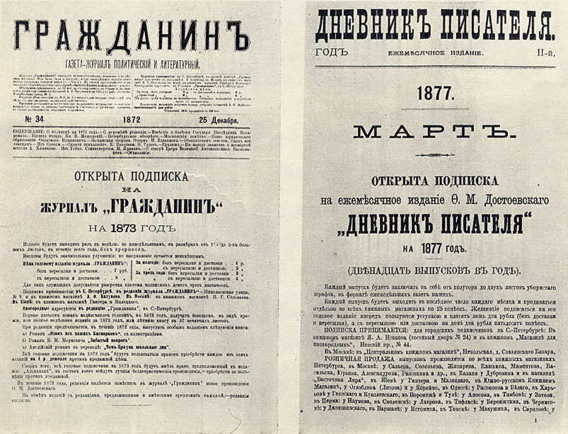 Журнал "Гражданин", "Дневник писателя" Ф. М. Достоевского. Обложки изданий